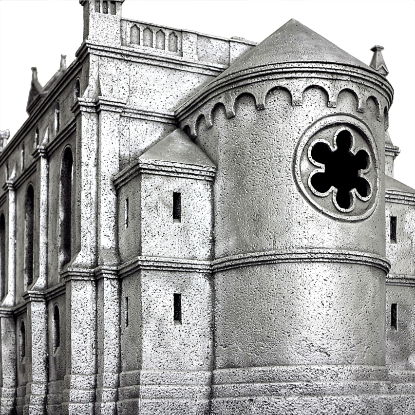 Rzeźba synagogi kłodzkiej (fragment). Widok od południa